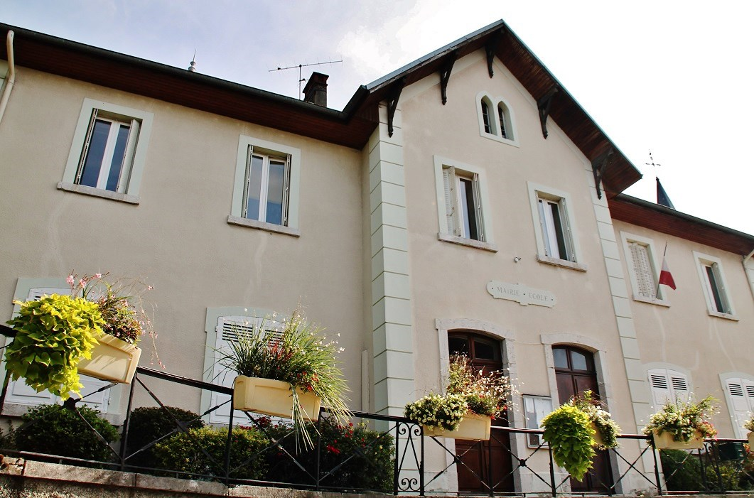 La Mairie